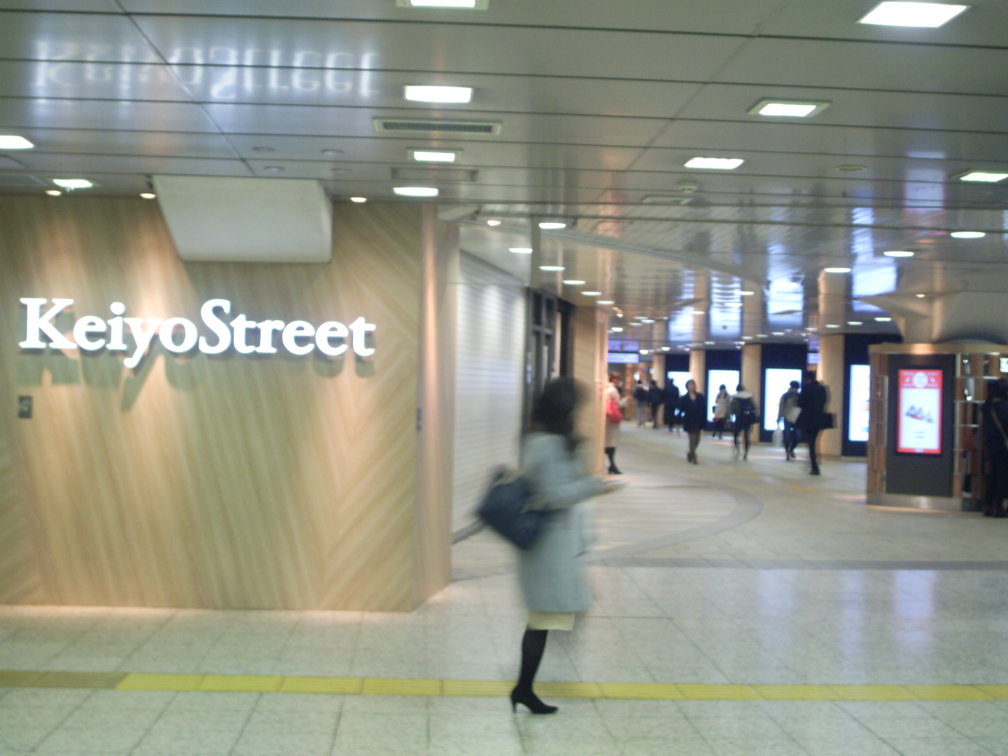 東京駅京葉線連絡通路に展開する駅ナカモールのKeiyo Street。東北・山形・秋田・北海道・上越・北陸新幹線の22・23番線直下に位置する ㊟カメラを起動すると日付機能が出荷時のものに初期化されるため、ファイル履歴の撮影・投稿日時とメタデータの原画像データの生成日時が異なります